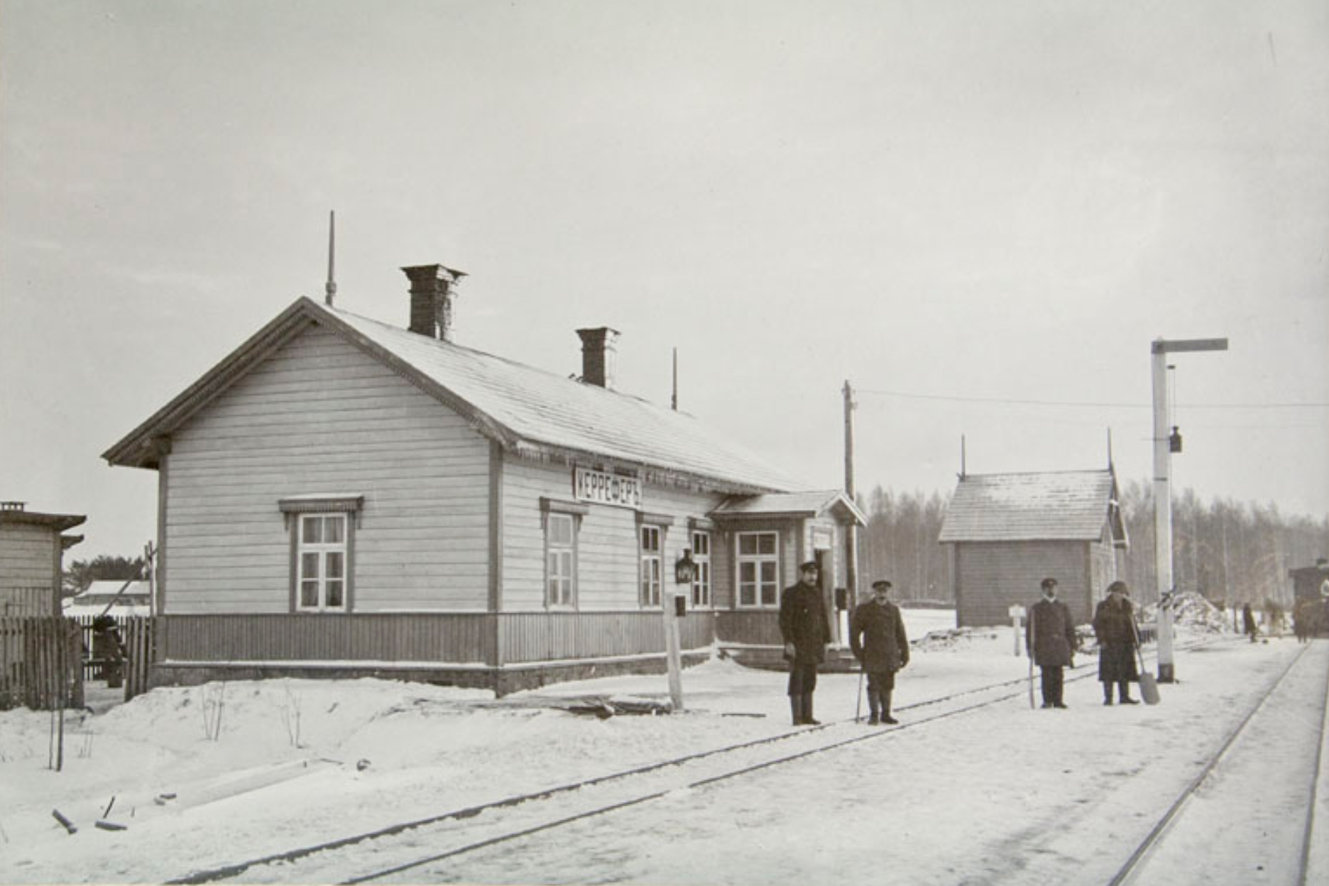 Kärevere jaamaesine 20. sajandi alguses